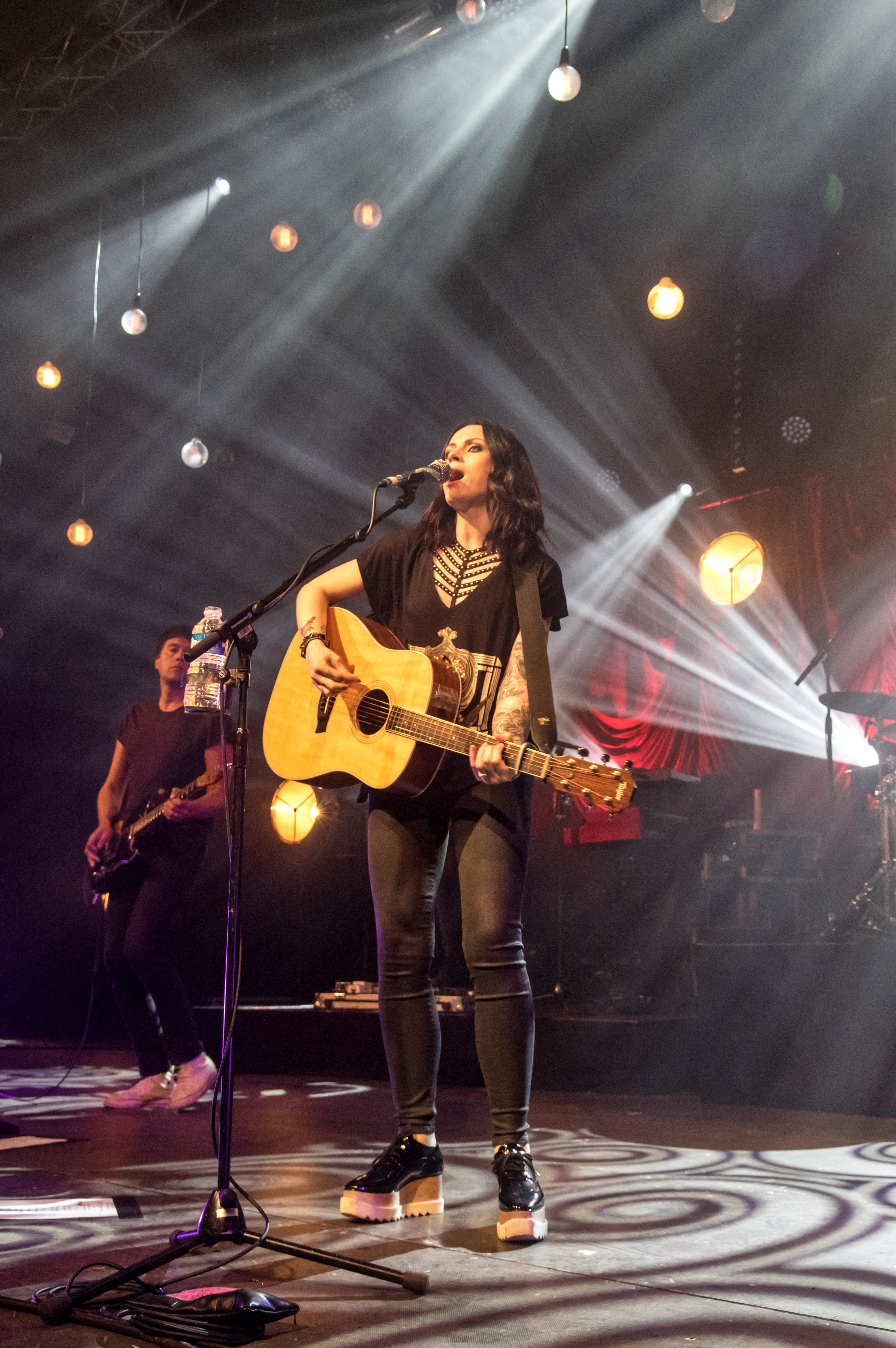 Bilder vom Zelt Musik Festival 2017 in Freiburg im Breisgau